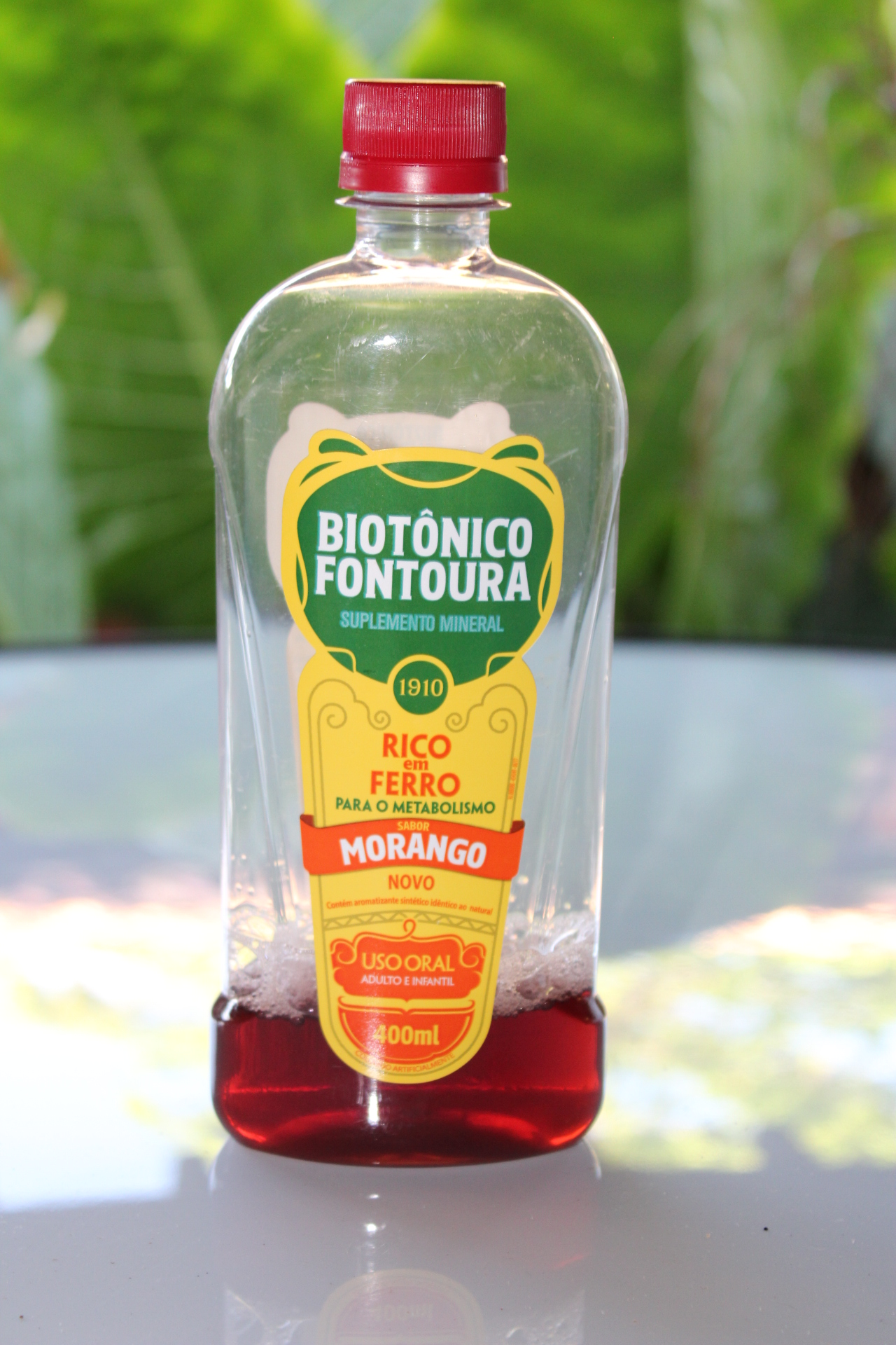 Frasco do Biotônico Fontoura na versão sabor morango.